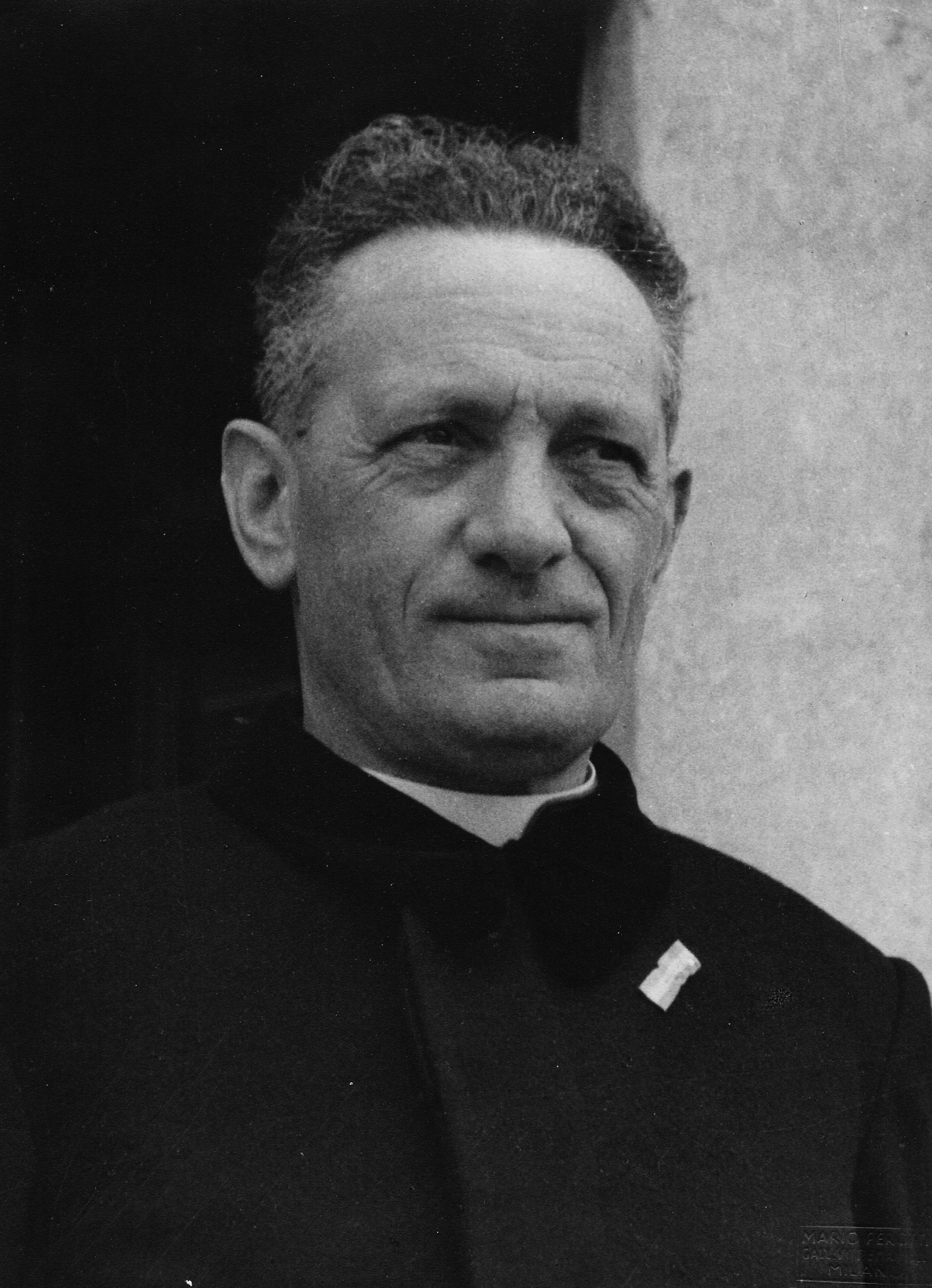 Foto a mezzo busto che ritrae Monsignor Giovanni Quaini con la spilla da partigiano